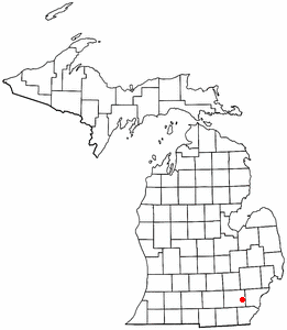 画像:MIMap-doton-Ypsilanti.PNG Category: Ypsilanti, Michigan